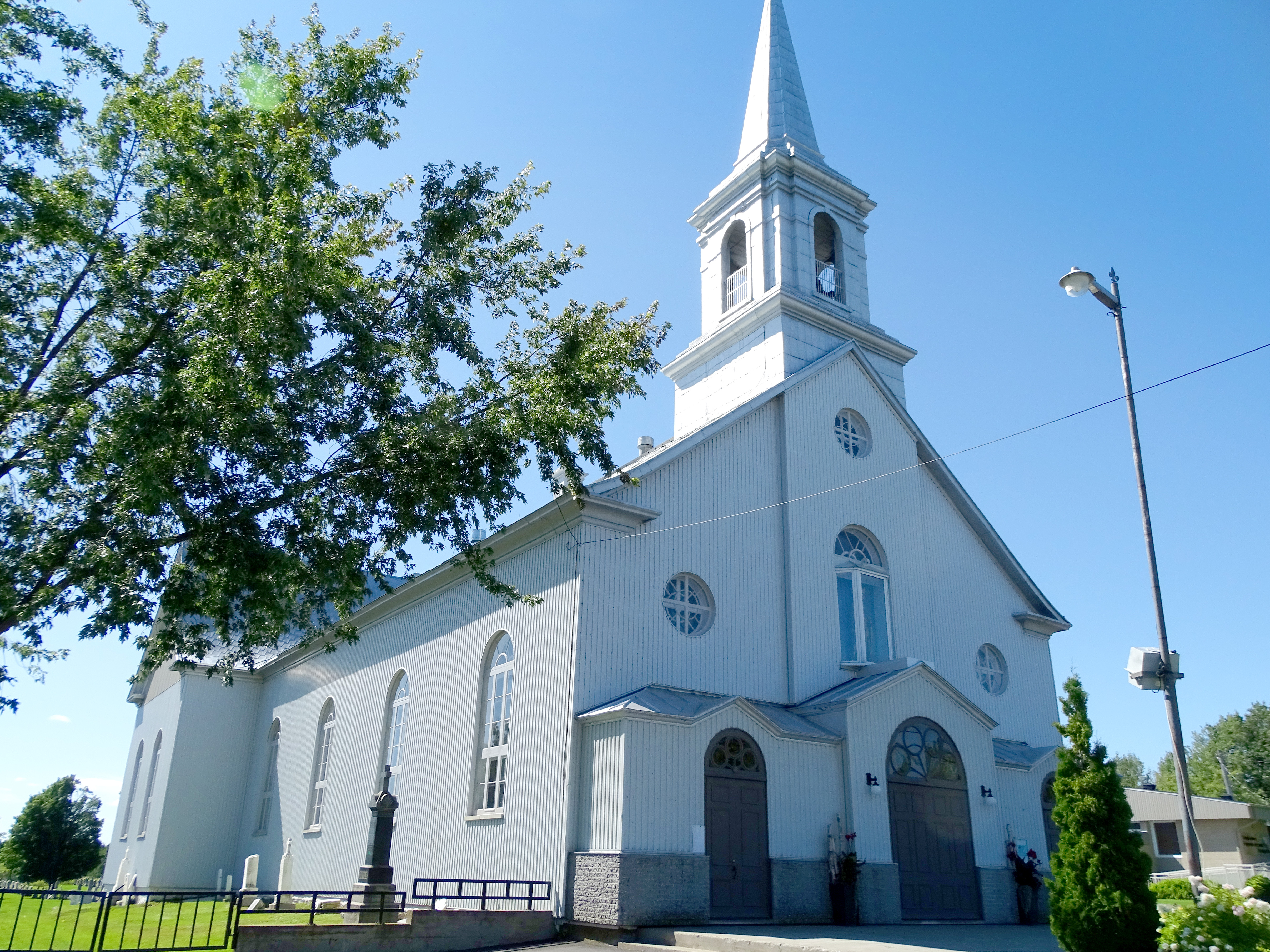 Église Saint-Edouard de Frampton